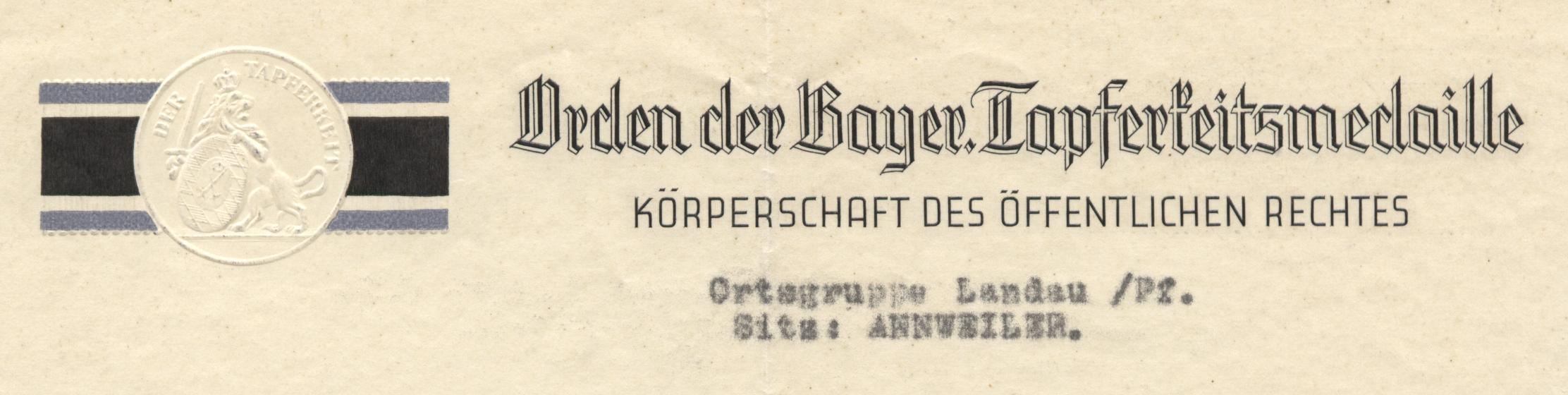 Briefkopf Orden der Bayerischen Tapferkeitsmedaille